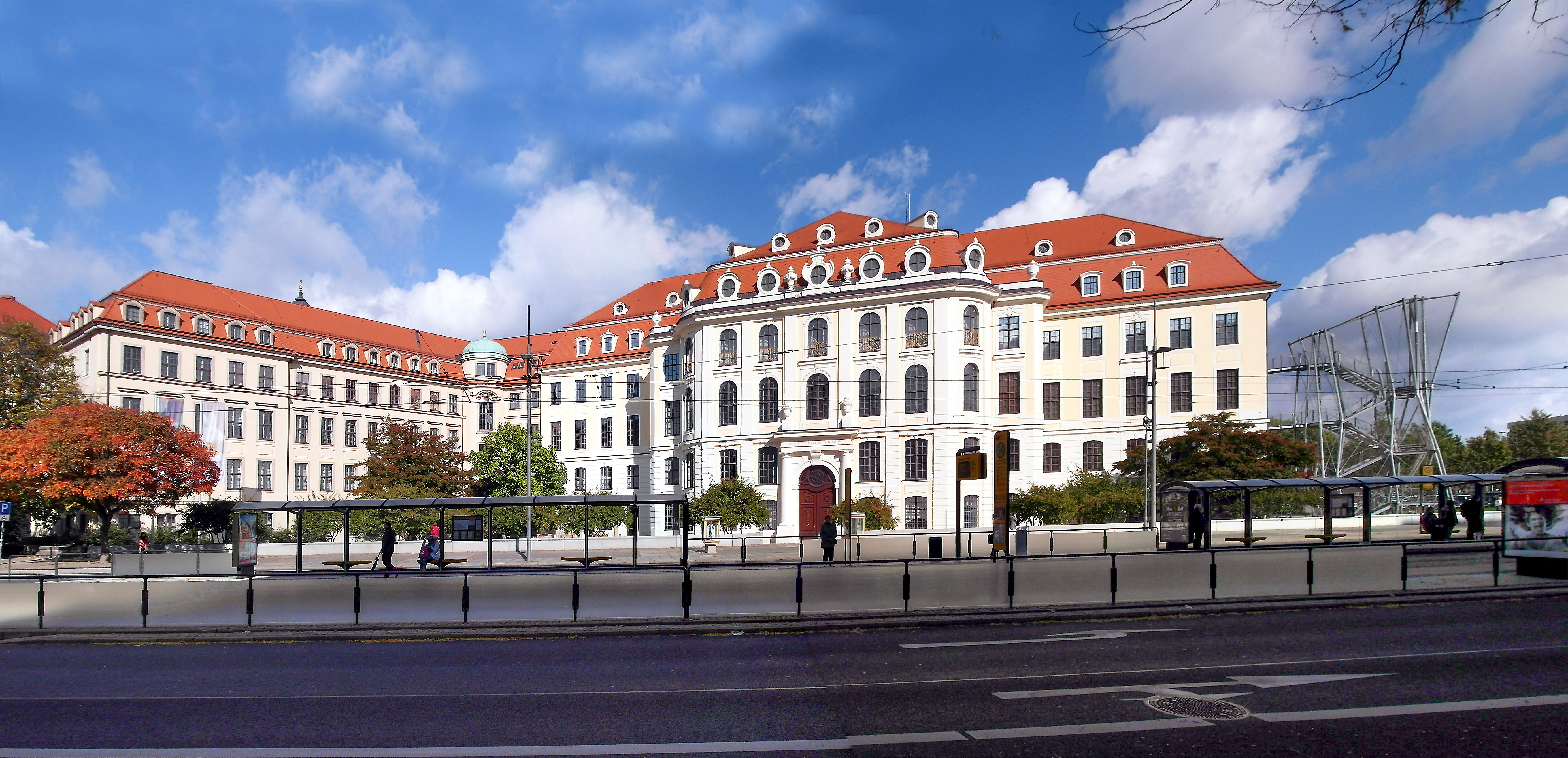 07.10.2012 01067 Dresden-Altstadt, Wilsdruffer Straße: Altes Landhaus, frühklassizistisch (1770-1776 von F. A. Krubsacius). Heute Museum für Stadtgeschichte. Postmoderne Feuertreppe 2005/06 (Architekt Rolf Klinkenbusch). [SAM1068-1069]20121007020MDR.JPG(c)Blobelt